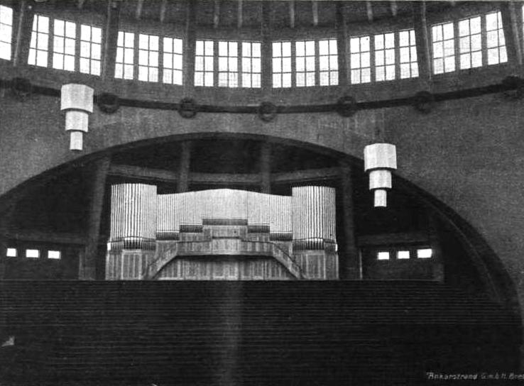 ehemalige Orgel der Jahrhunderthalle in Breslau